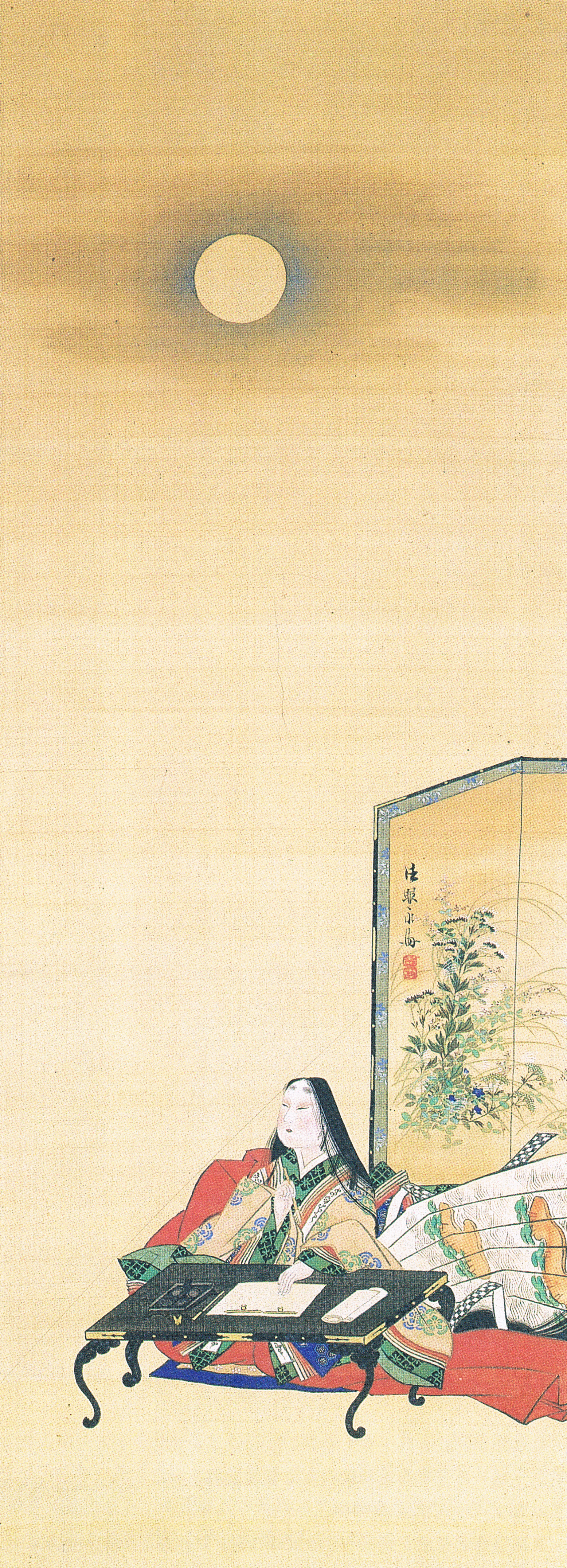 佐竹永海筆 紫式部図 絹本着色